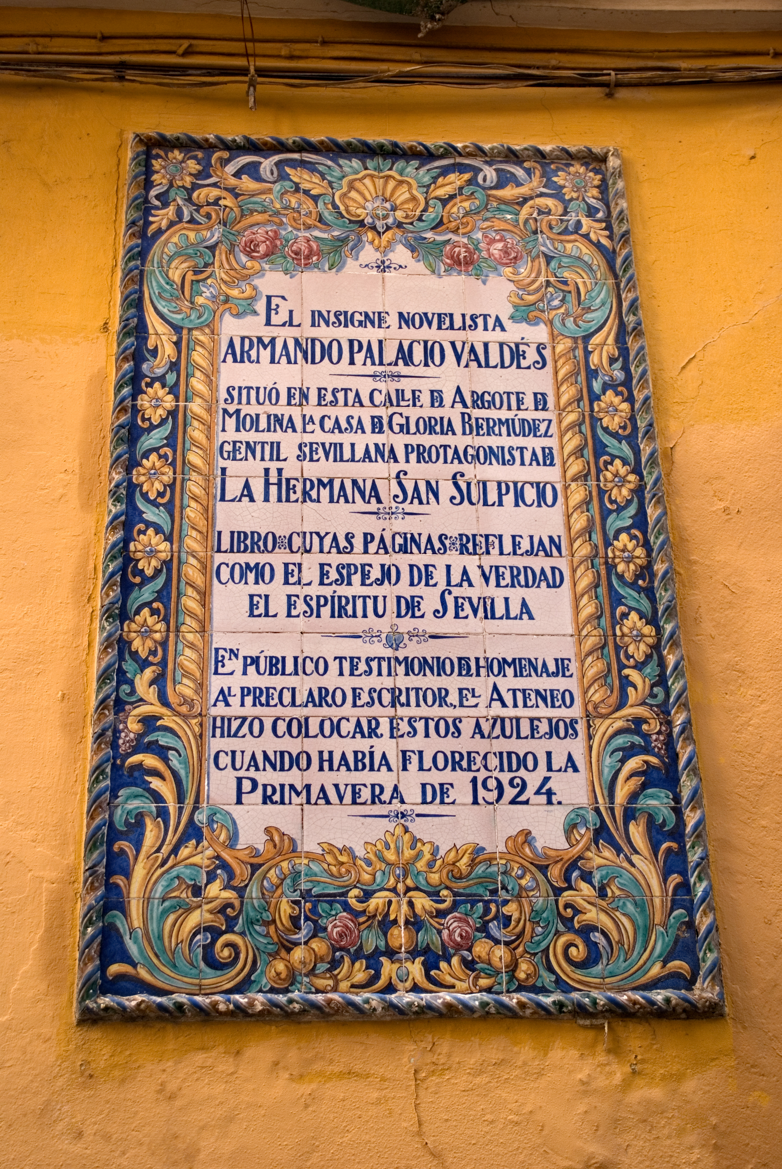 Azulejo situado en Sevilla, en la calle Argote de Molina, en la casa donde se desarrolla la acción de la novela "La hermana San Sulpicio" del escritor Armando Palacio Valdés.